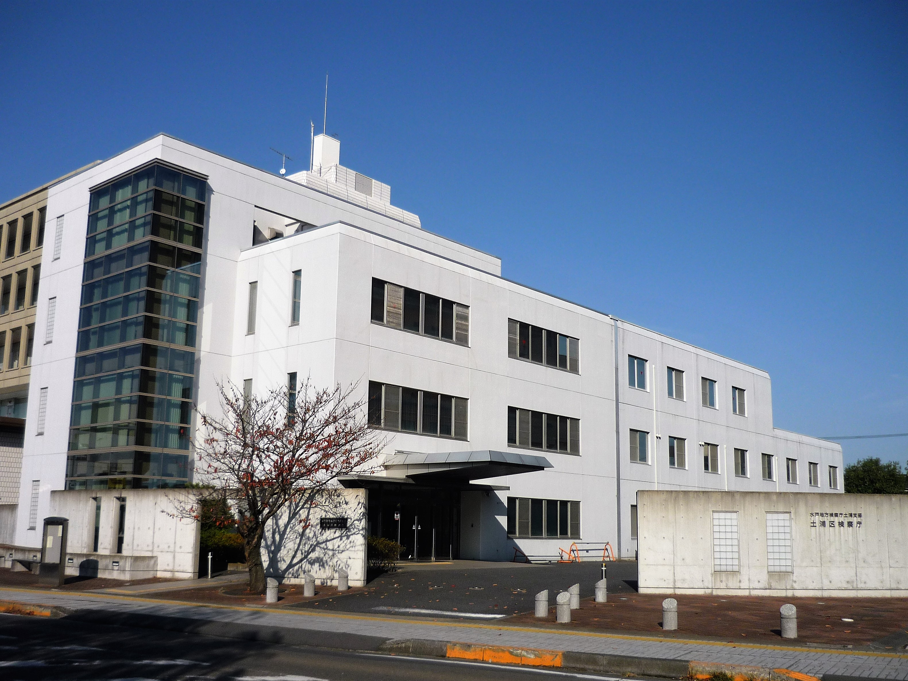 水戸地方検察庁土浦支部・ 土浦区検察庁 Panasonic Lumix DMC-FS3